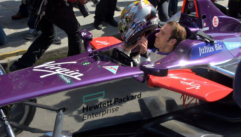 Jean-Eric Vergne devant les studios d'Europe 1